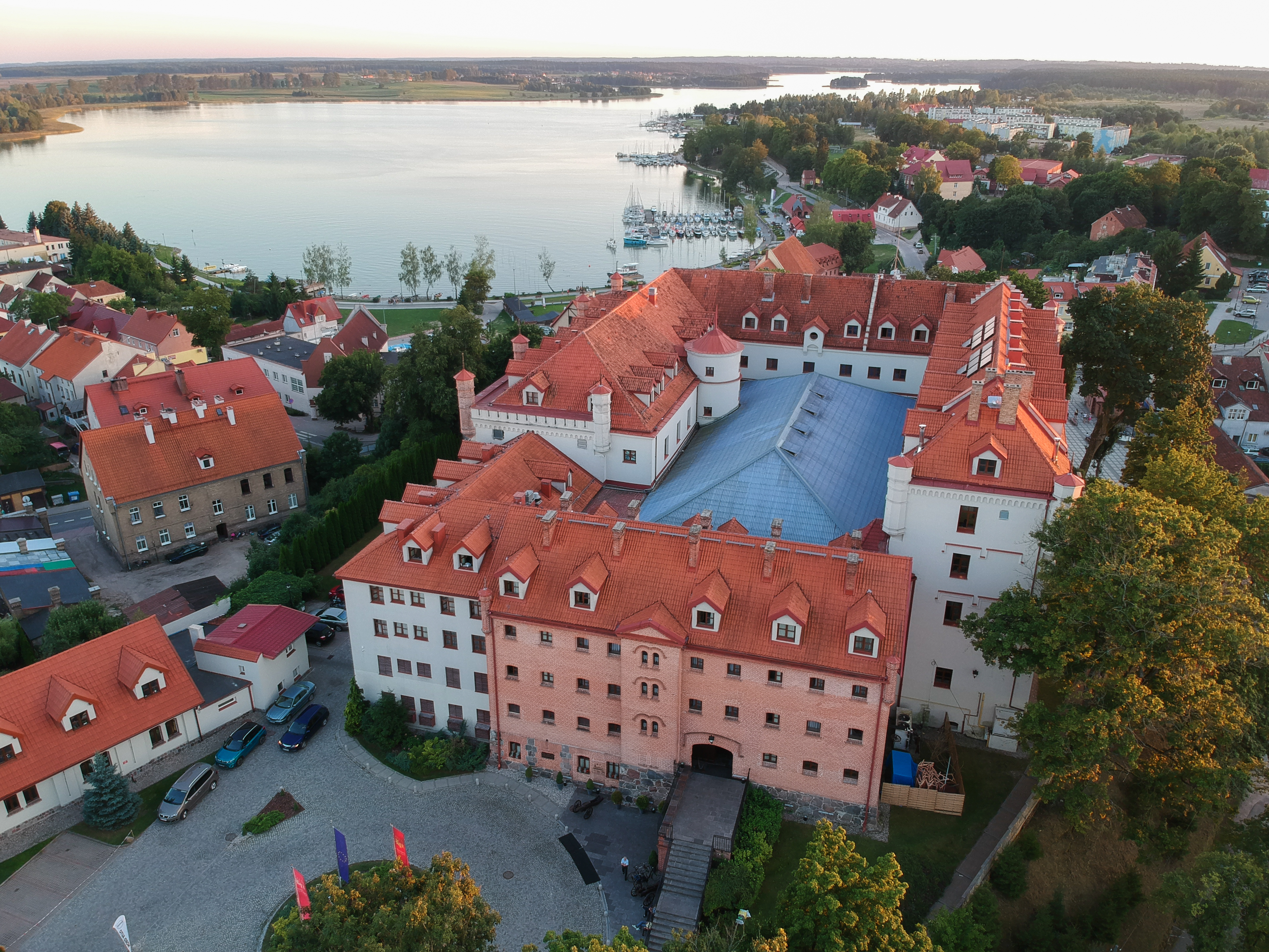 Ryn, Zamek w Rynie Wikidata has entry Q1095347 with data related to this item.